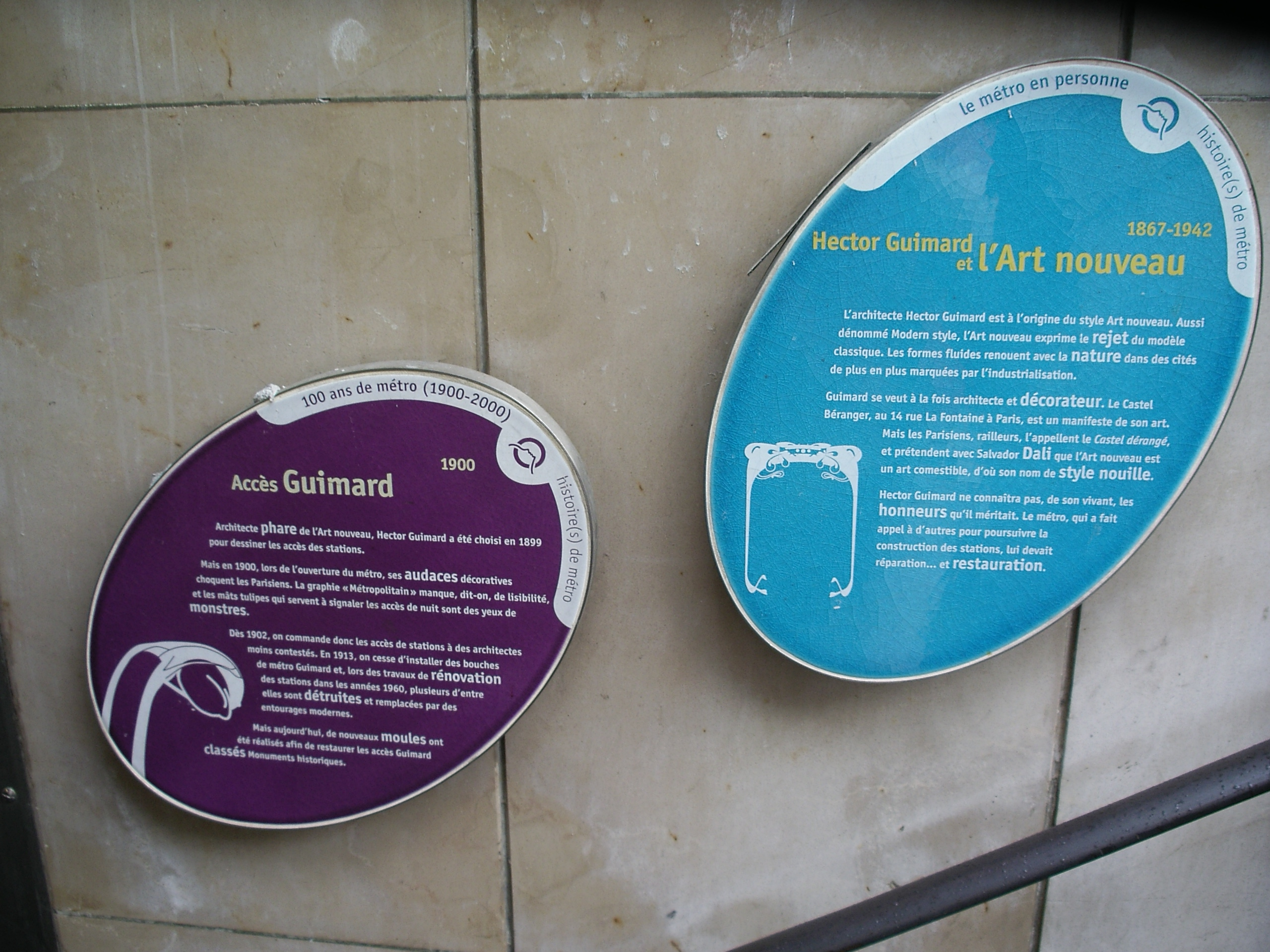 zelfgemaakte foto